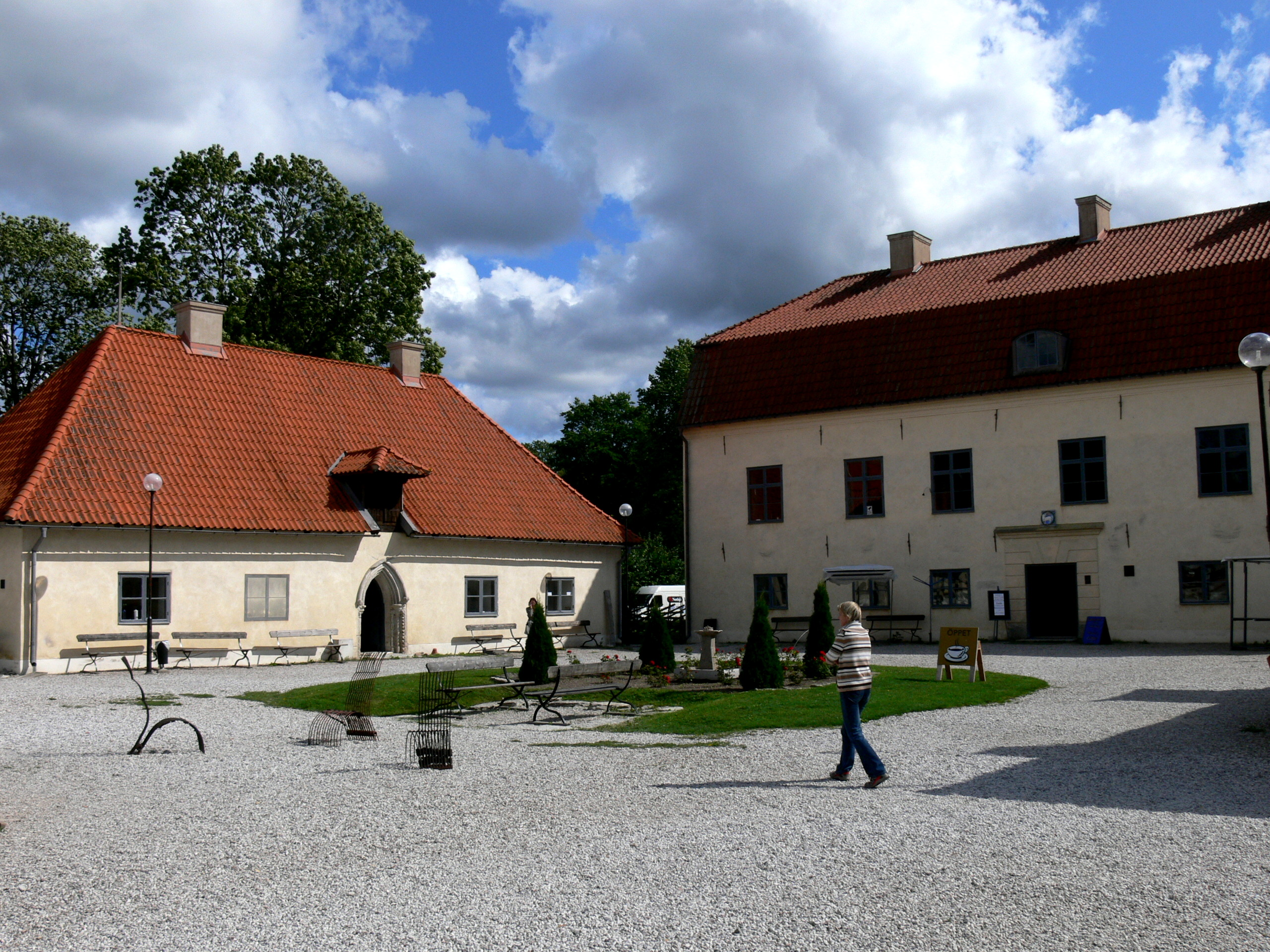 Roma kungsgard auf Gotland. Gutshof